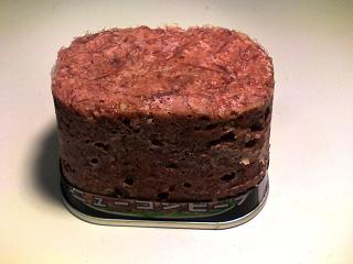 Nozaki's new corned beef3 (ノザキのニューコンビーフ内容)